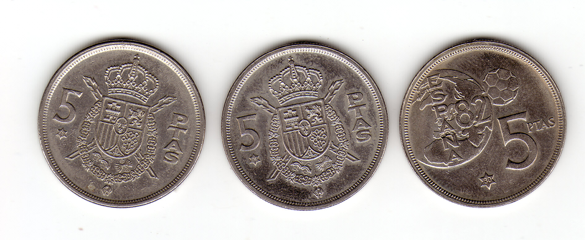 5 peseta, duros joancarlins, reverse El escudo lleva el aspa de Borgoña.